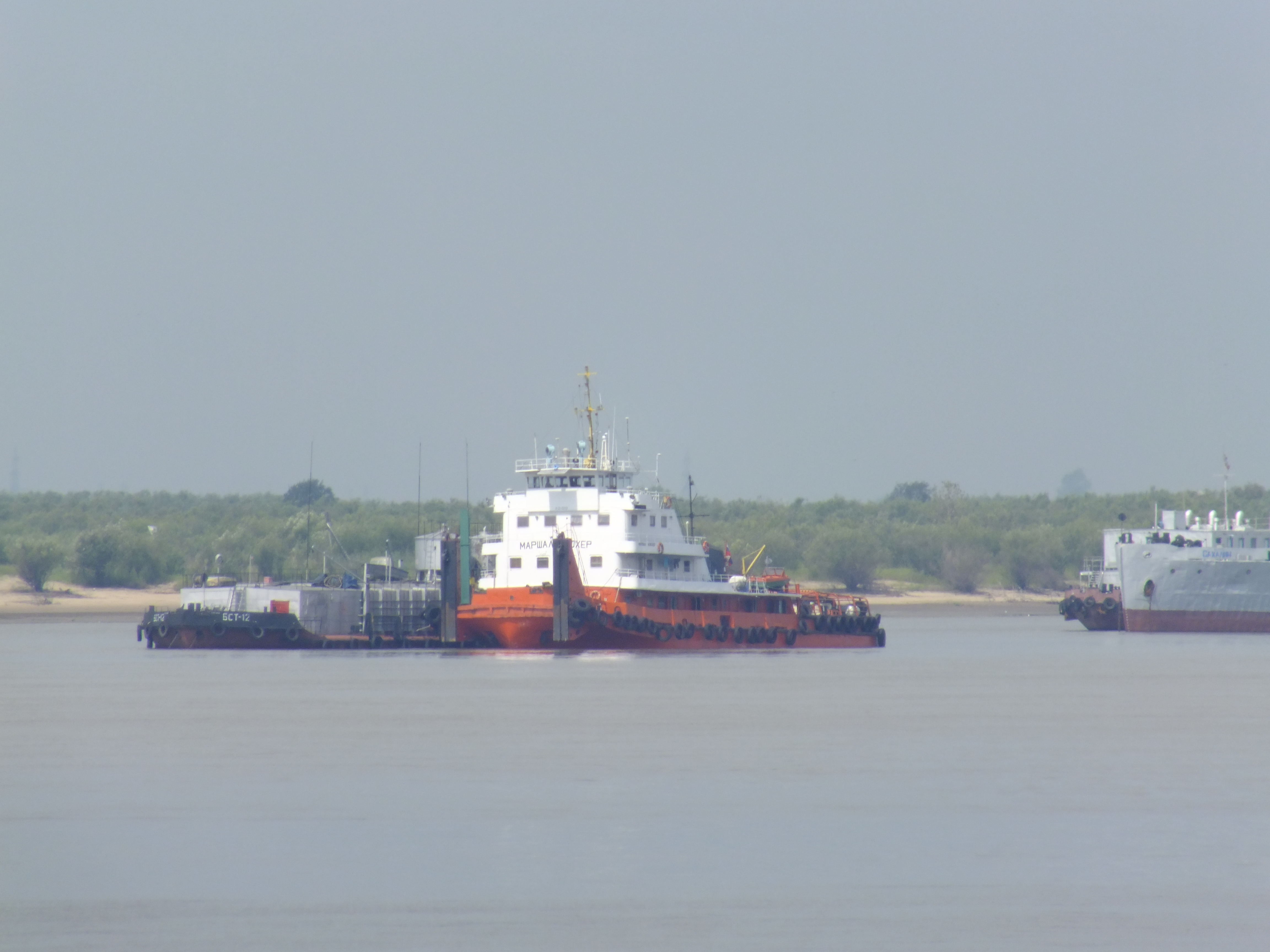 Буксир Маршал Блюхер на Амуре